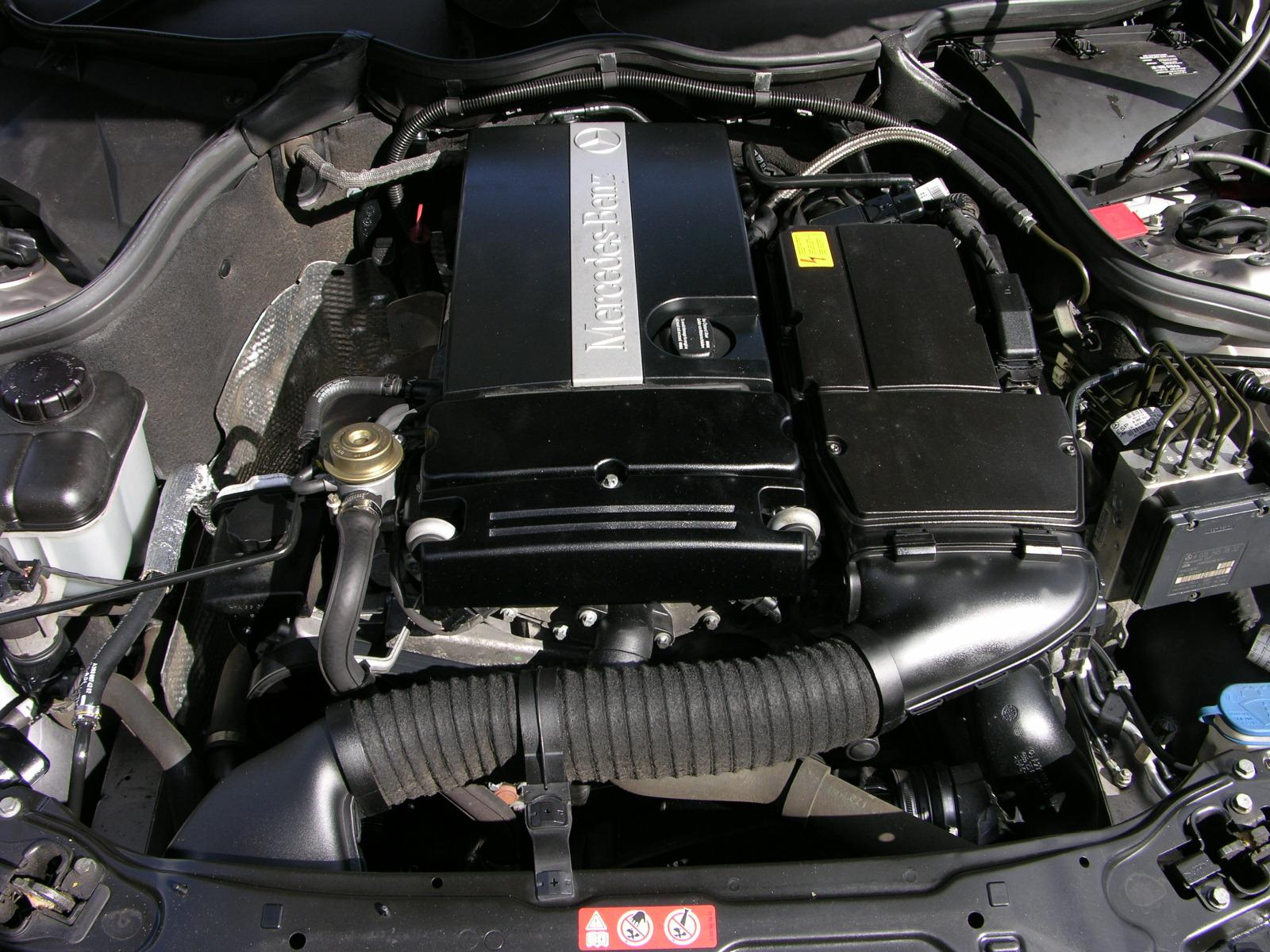 Mercedes Benz CLK 200 Kompressor